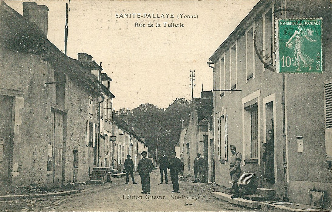 Sainte-Pallaye (Yonne) - rue de la Tuilerie - vers 1920